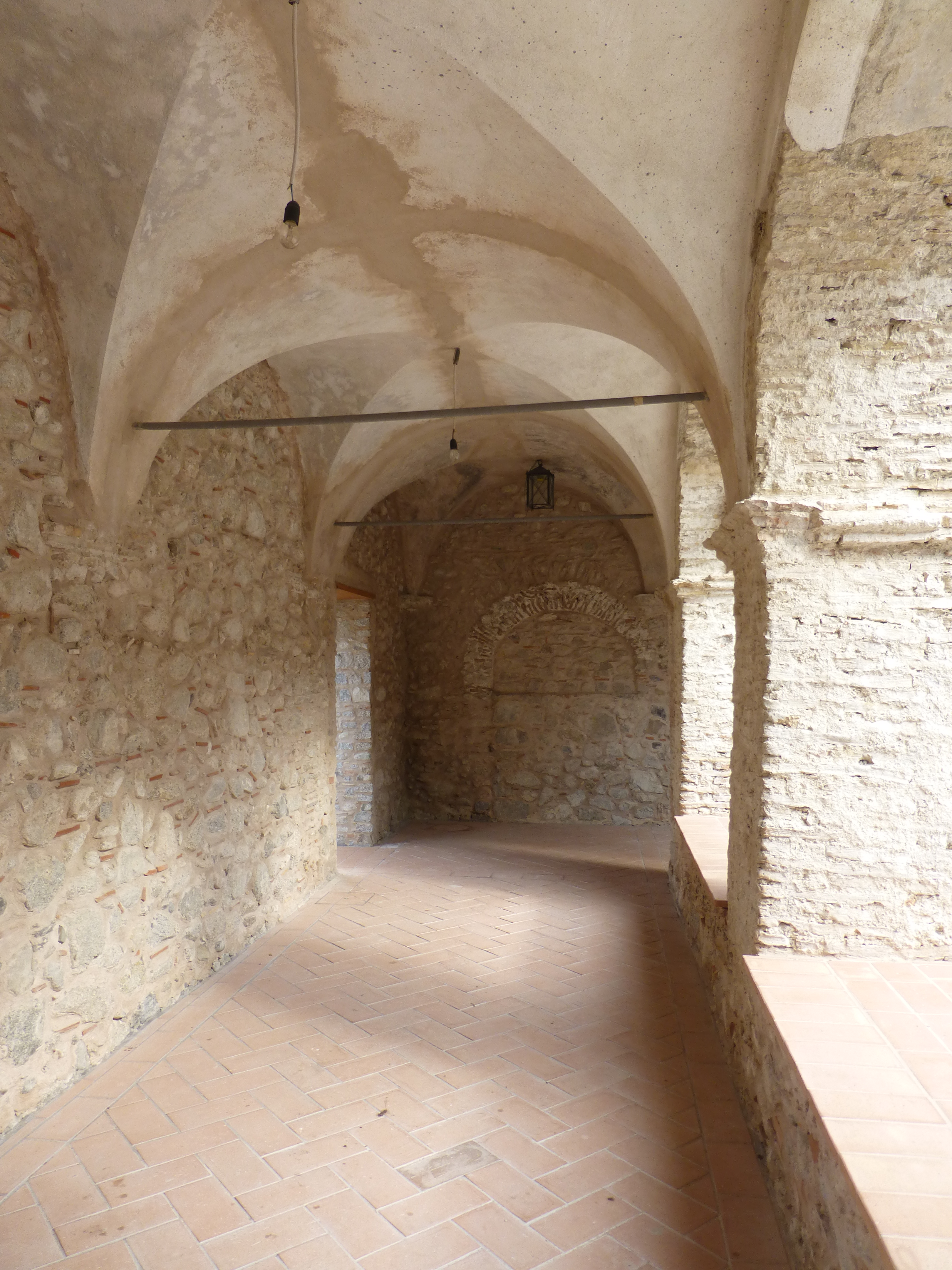 Convento dei domenicani placanica piano terra